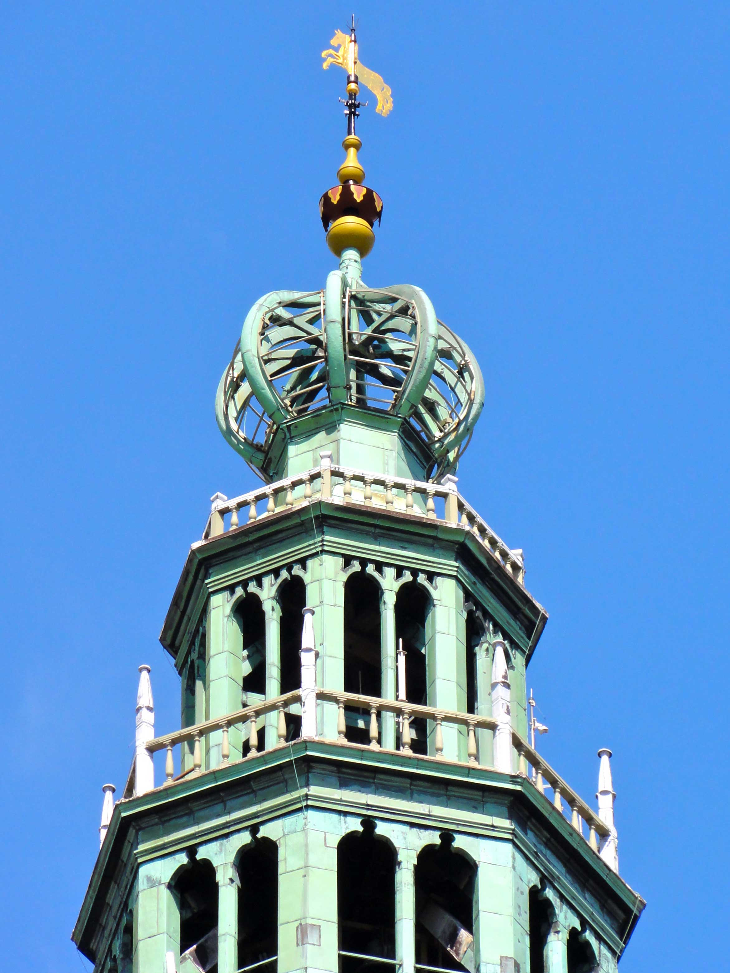 Spits Martinitoren Groningen